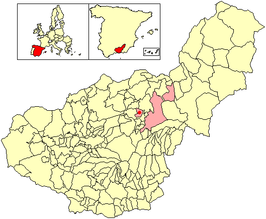 Situación de la localidad de Belerda (en el municipio de Guadix) respecto a la provincia de Granada, en España.